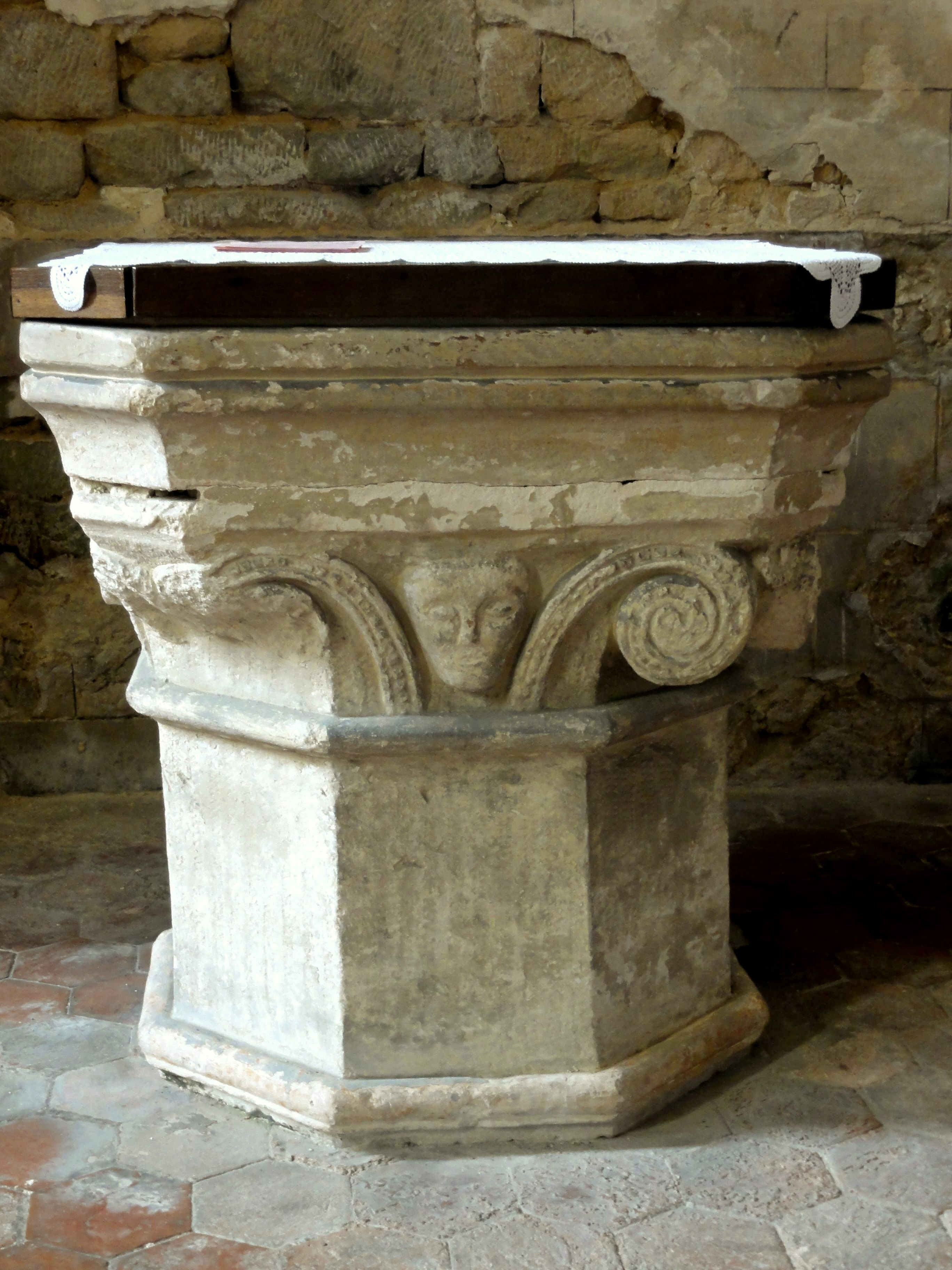 Fonts baptismaux.